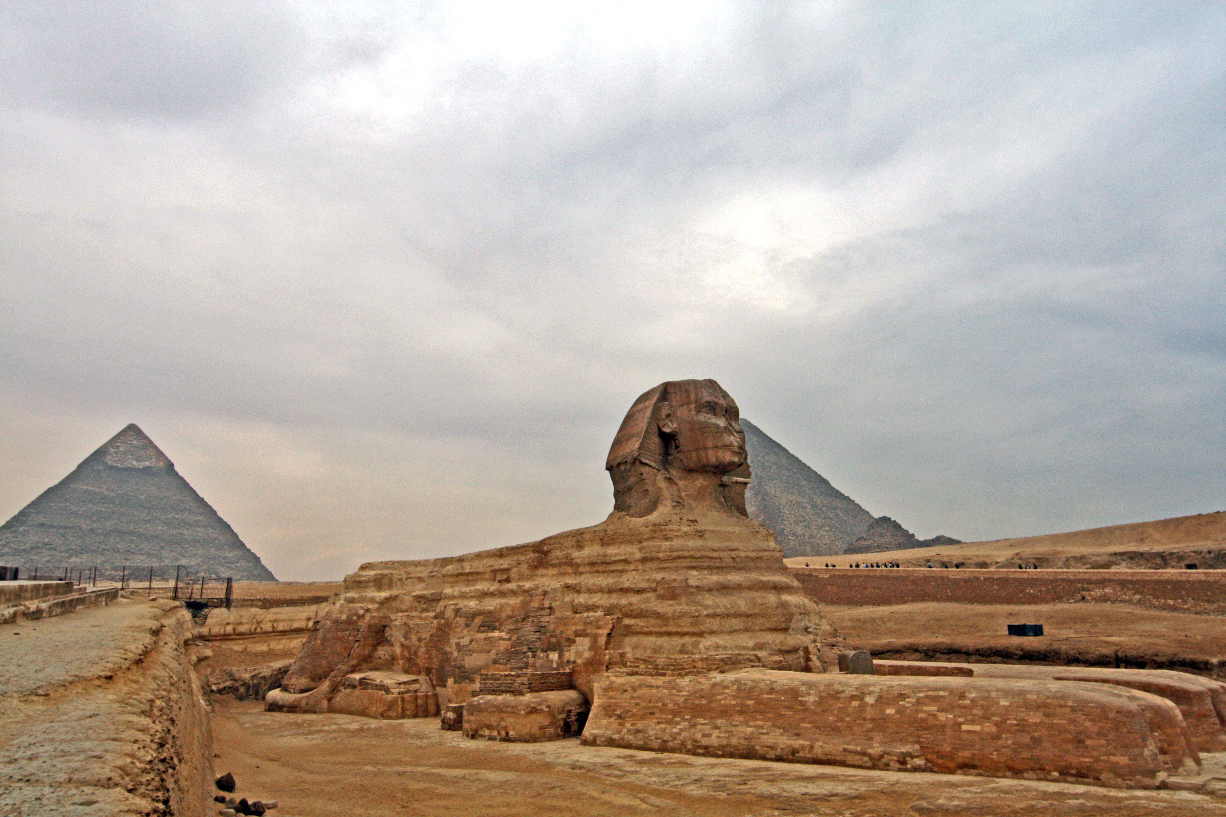 Le sphinx de Gizeh vu de côté